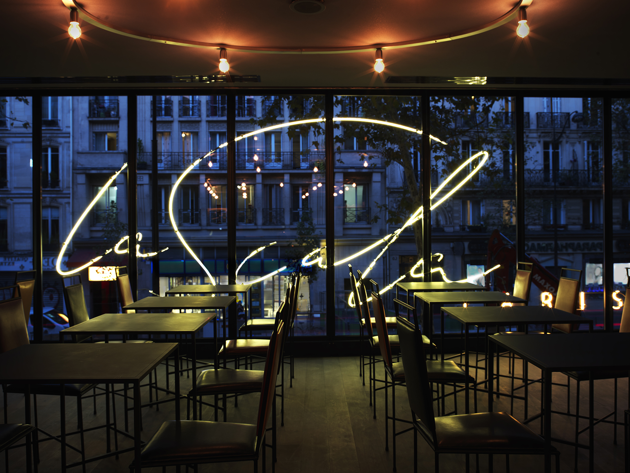 Photo du Restaurant & Bar La Scala Paris